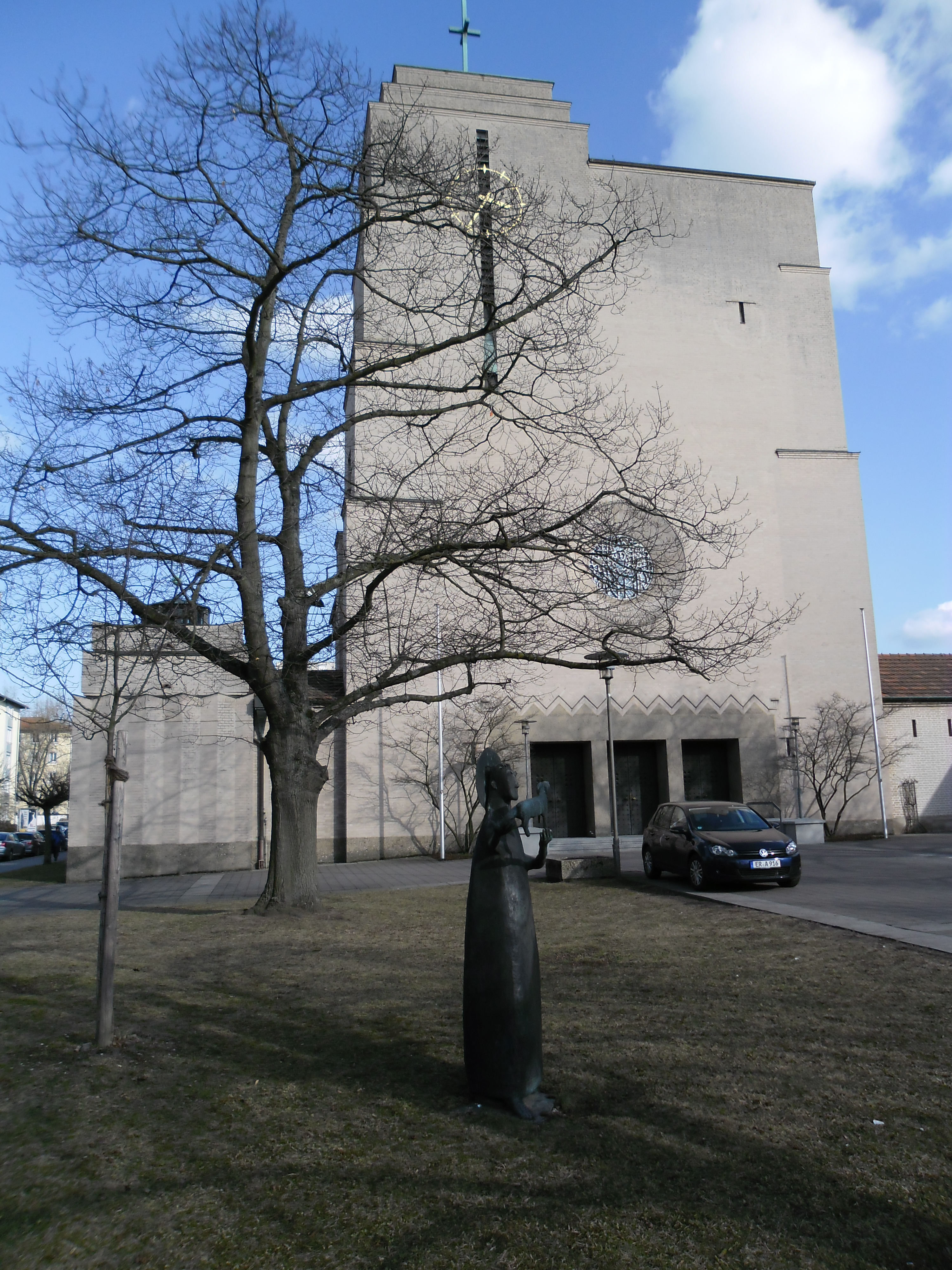 Die Bronzeplastik „Der gute Hirte“ von Heinrich Kirchner (1902–1984) vor der Kirche St. Bonifaz (1928) an der Ecke Hofmannstraße/Sieboldstraße zeigt den Bischof von Mainz und Gründer zahlreicher Klöster mit einem seiner Attribute, einem Fuchs, in den Händen.